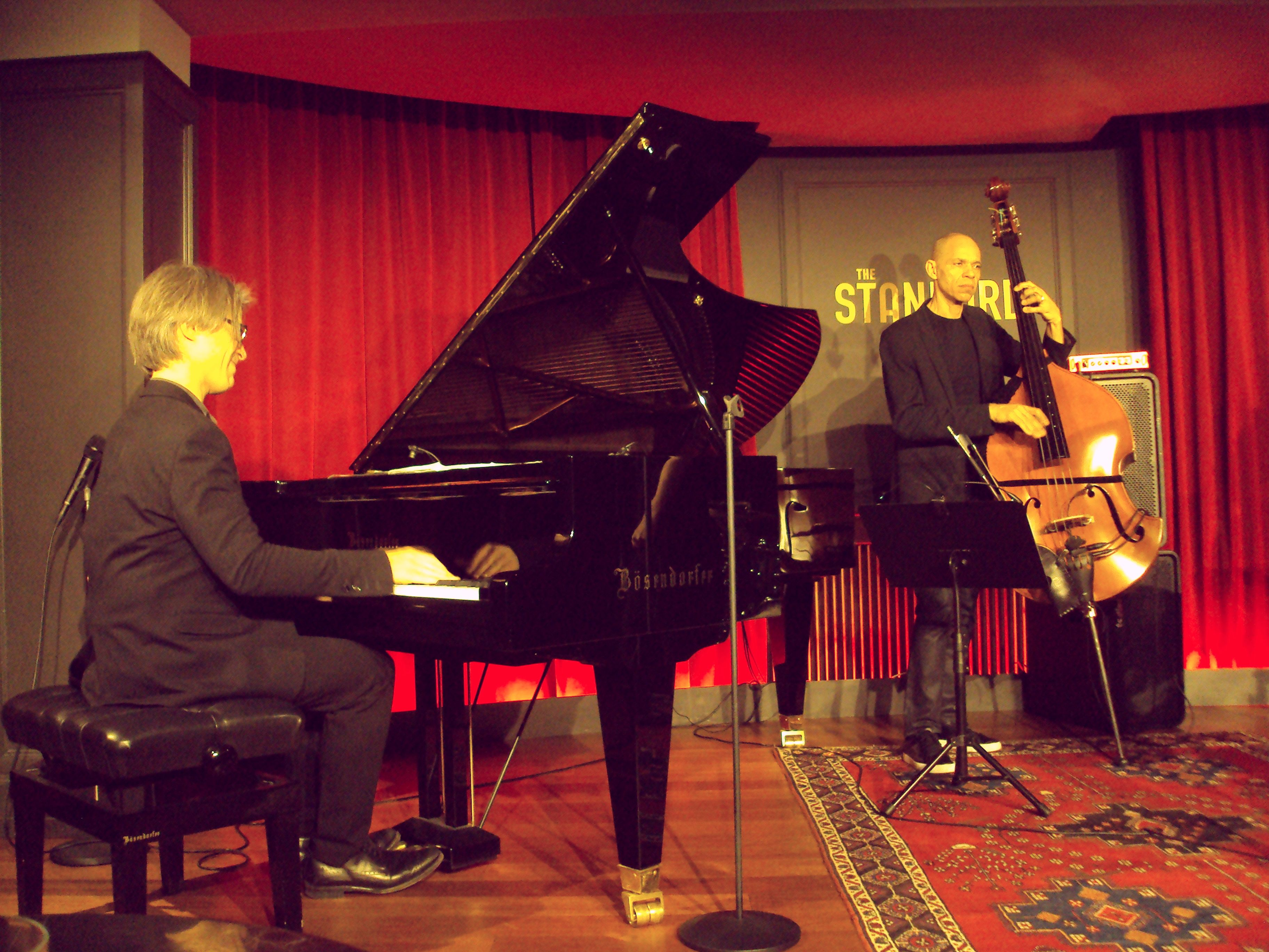 Kopenhagen, 13. Dez. 2014, The Standard (Jazz Club): Edda Magnason (Gesang, Piano) & Niels Lan Doky Trio featuring Ira Coleman (Bass) & Niclas Bardeleben (Schlagzeug)